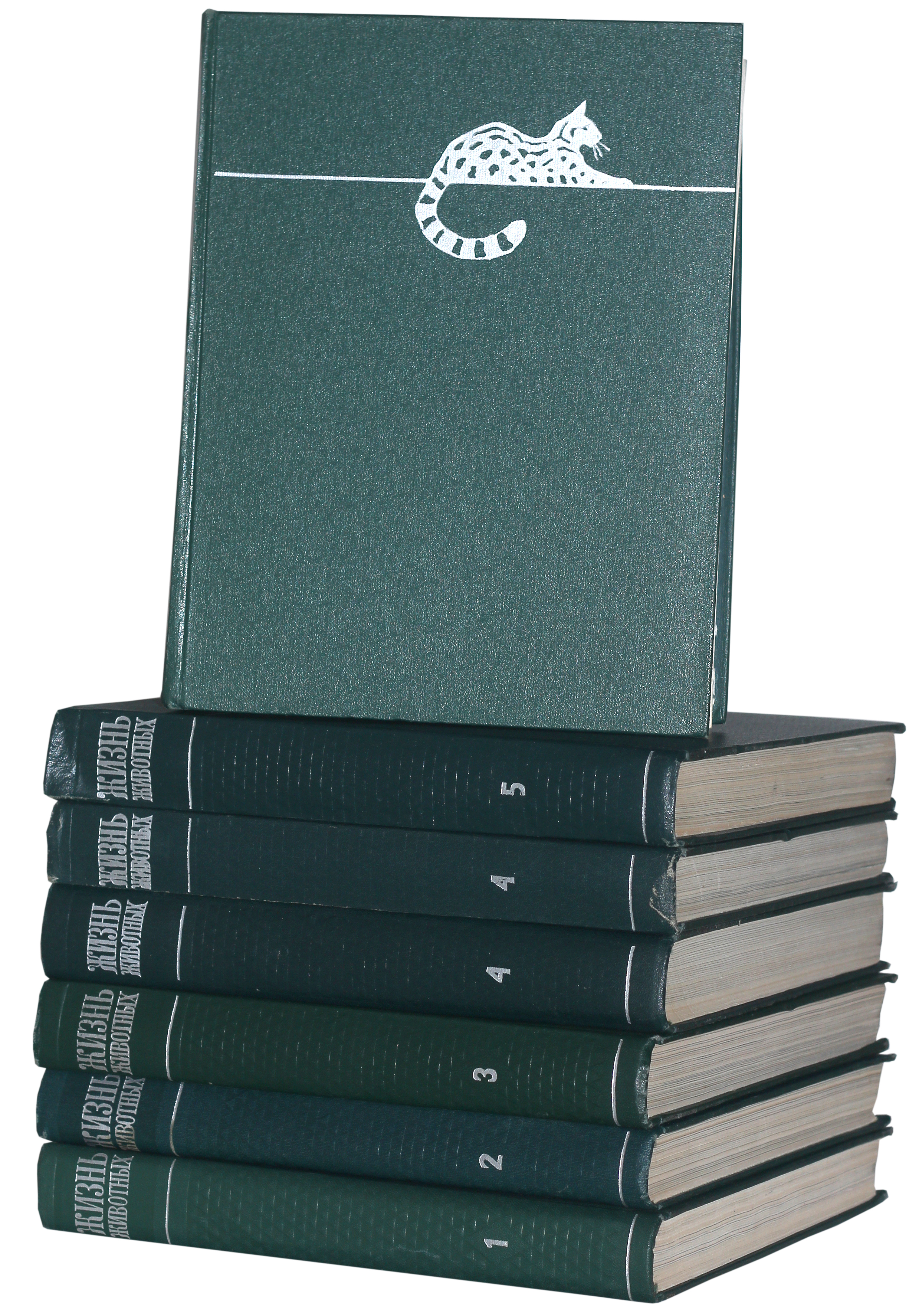 Жизнь животных в 6 томах и в 7 книгах. Издательство "Просвещение".